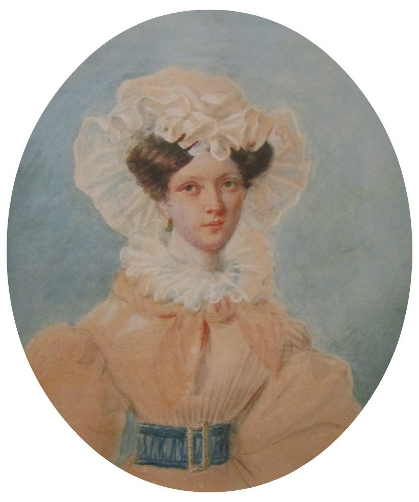 Княгиня Александра Александровна Трубецкая, урожденная Нелидова (07.01.1807—10.12.1886)